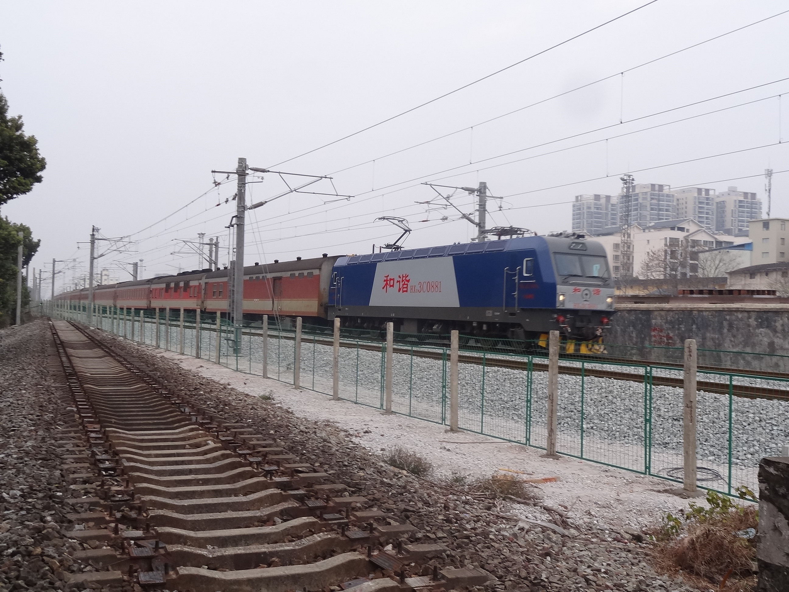 中文（中国大陆）: HXD3C牵引K1191接近桂林北I场.jpg